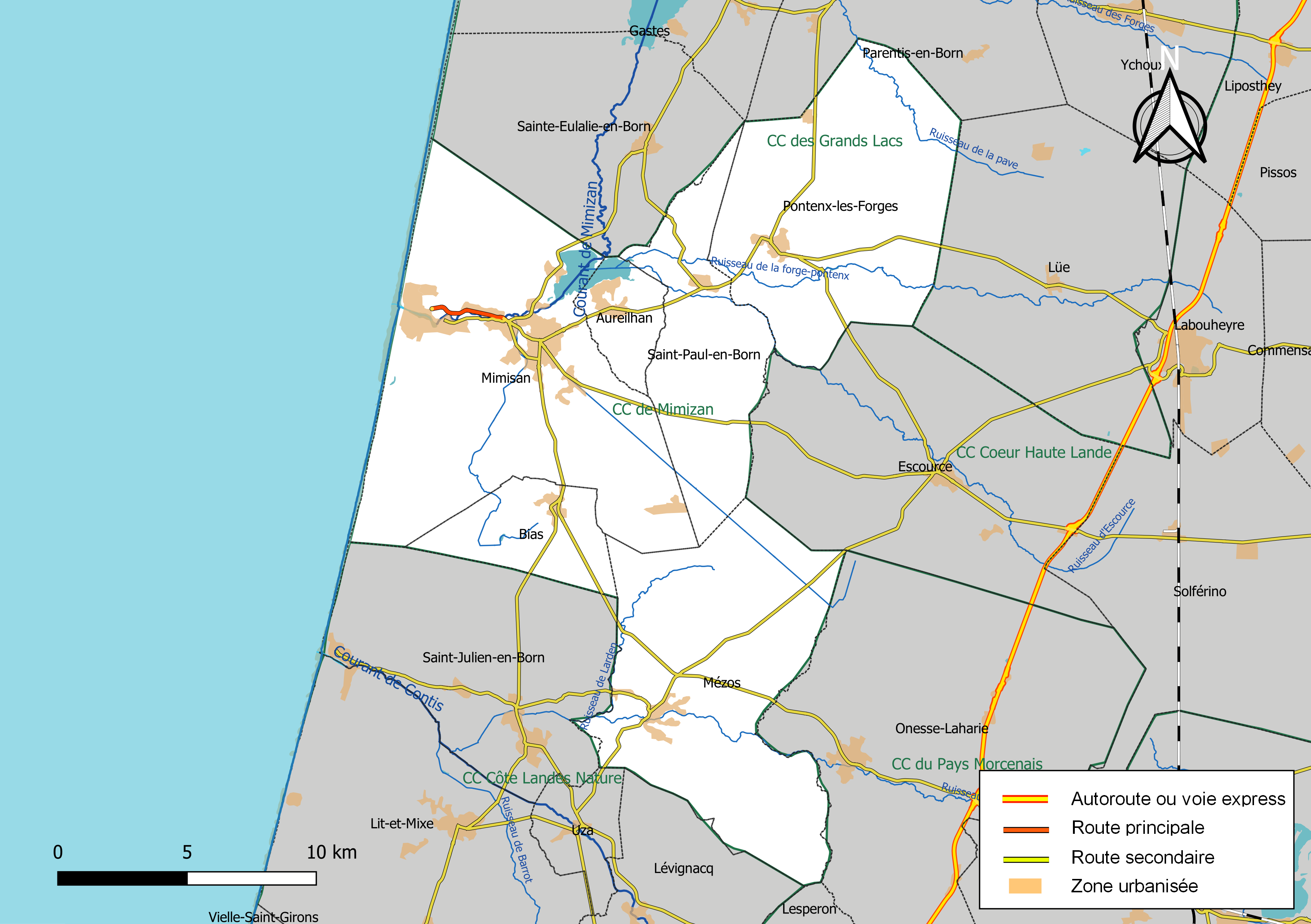 Carte géographique de la Communauté de communes de Mimizan, département des Landes, France. Composition au 1er janvier 2019.